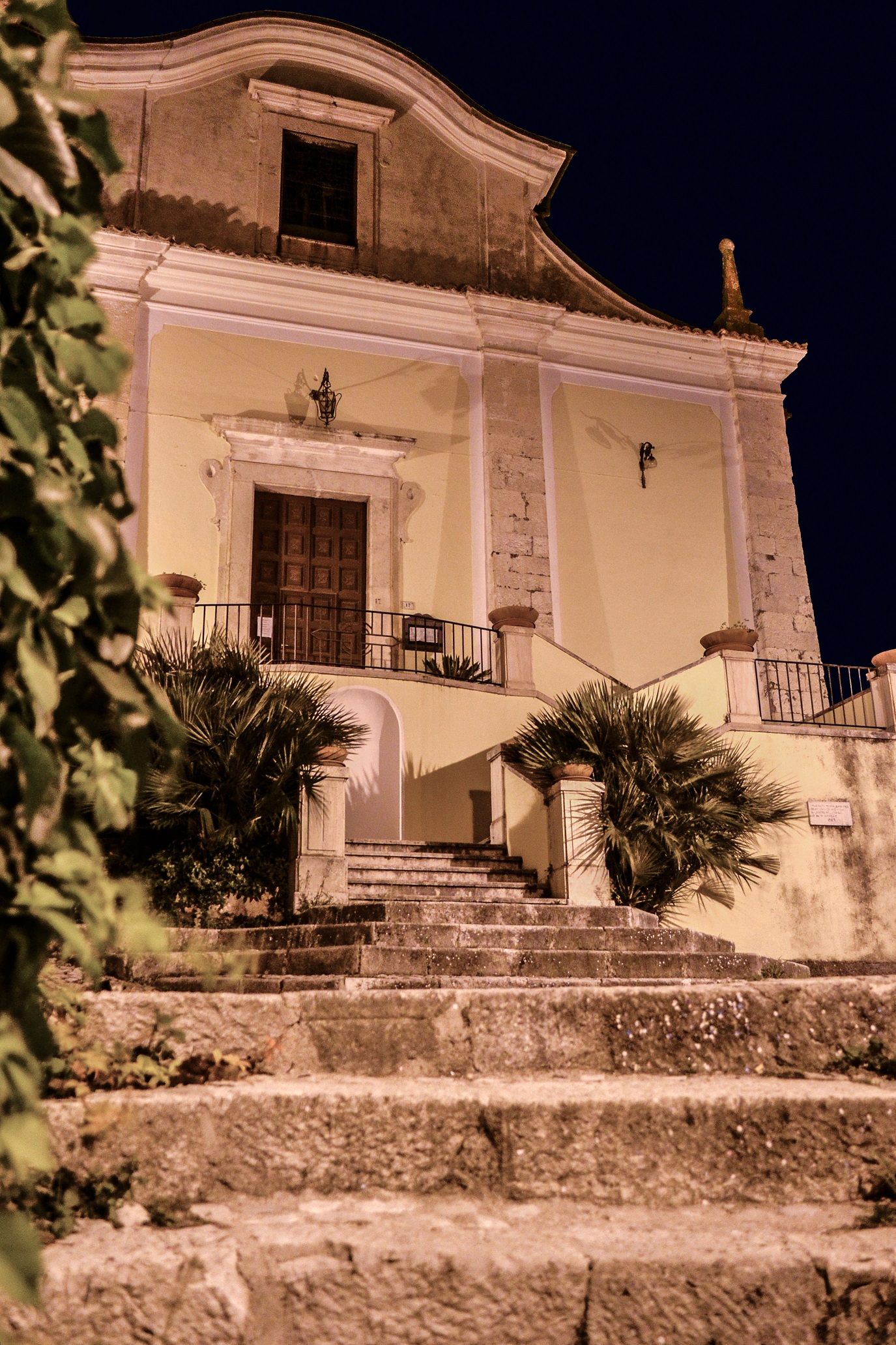 Il Santuario di San Donato Val di Comino eretto nella parte alta del paese